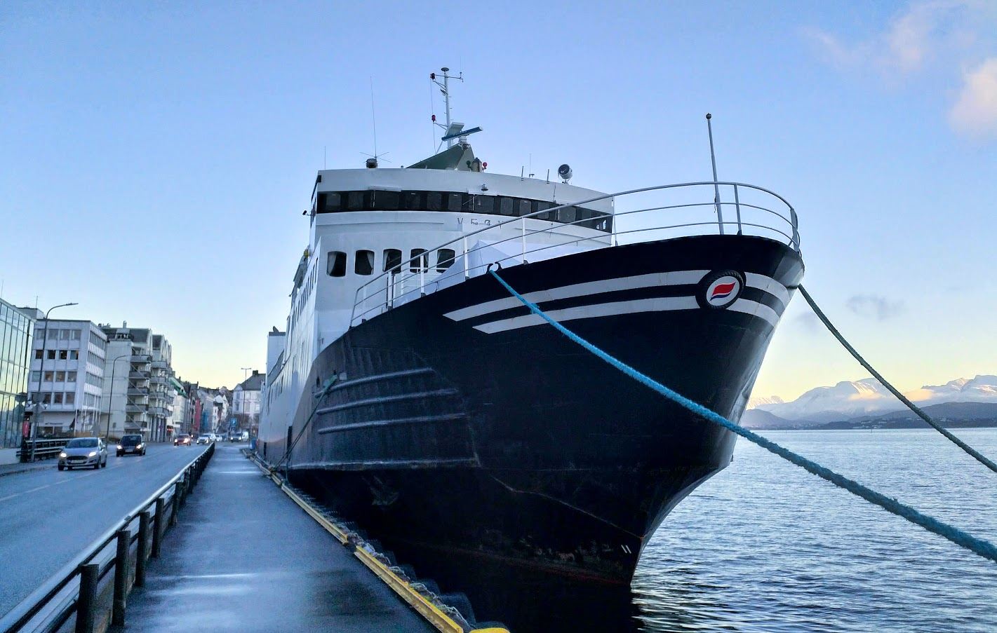 MF «Veøy» lagt opp i vinteropplag ved Ålesund by den 11. desember 2018